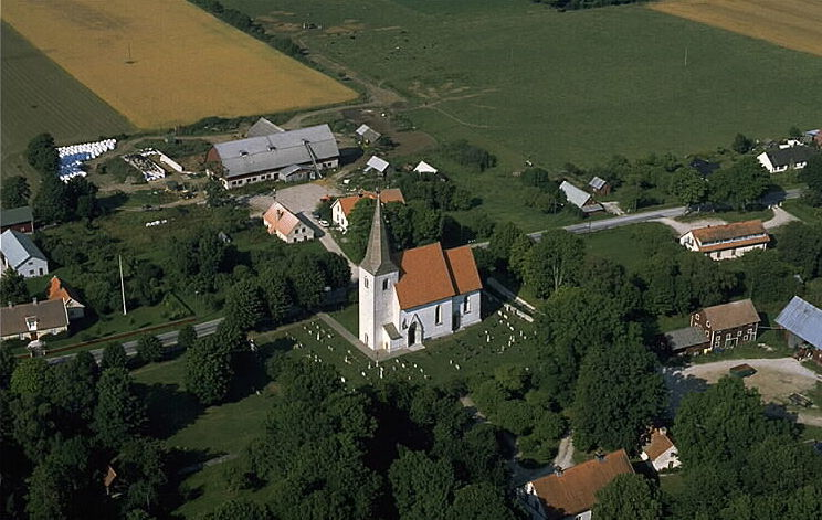 Motiv: Martebo kyrka Nyckelord: Flygbilder, Riksintressen Kategori: KyrkbyMartebo kyrka